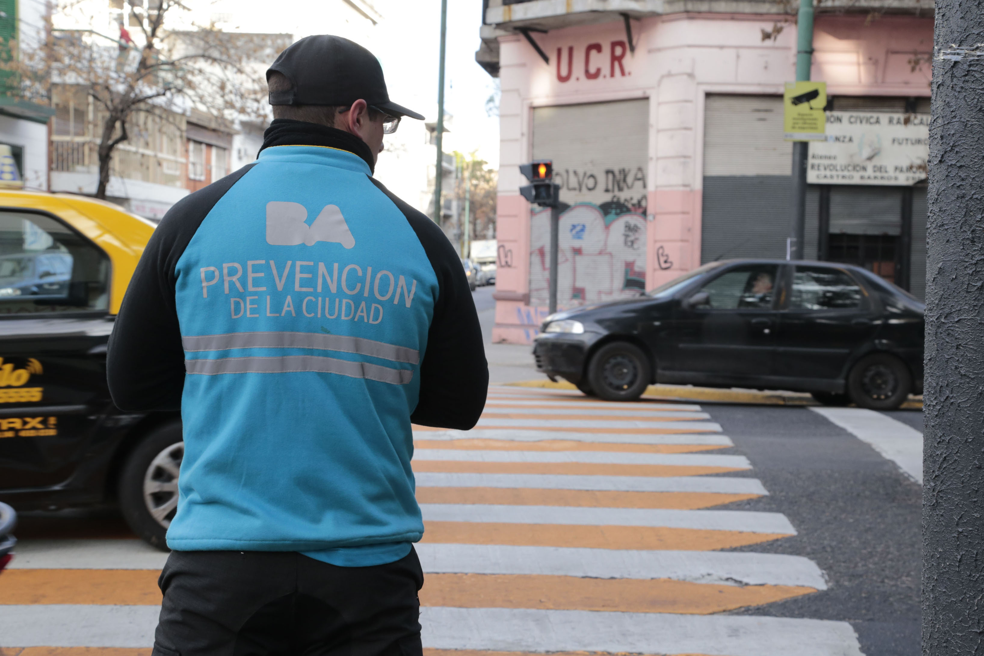 Un agente de Prevencion de la Ciudad desplegado en un Sendero Escolar.